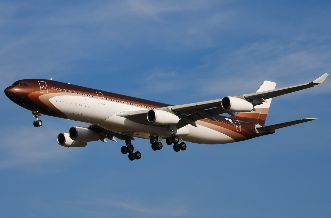 Photo prise à l'aéroport de Toulouse-Blagnac (LFBO) en France. Picture take at Toulouse-Blagnac Airport (LFBO) in France.